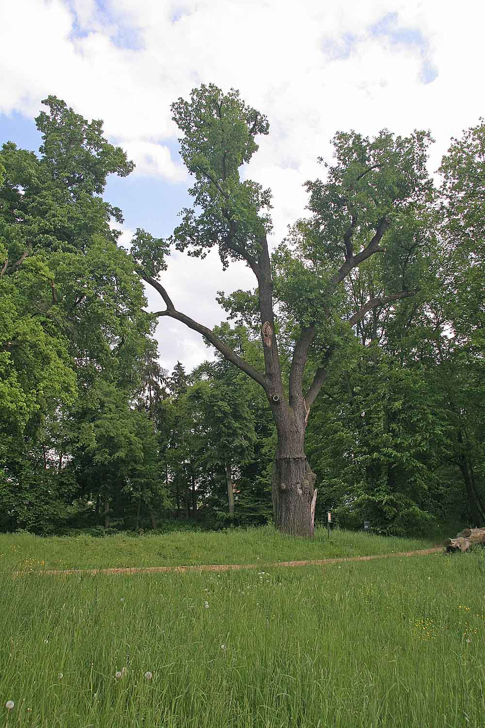 Památný dub letní v zámeckém parku Dobřenice